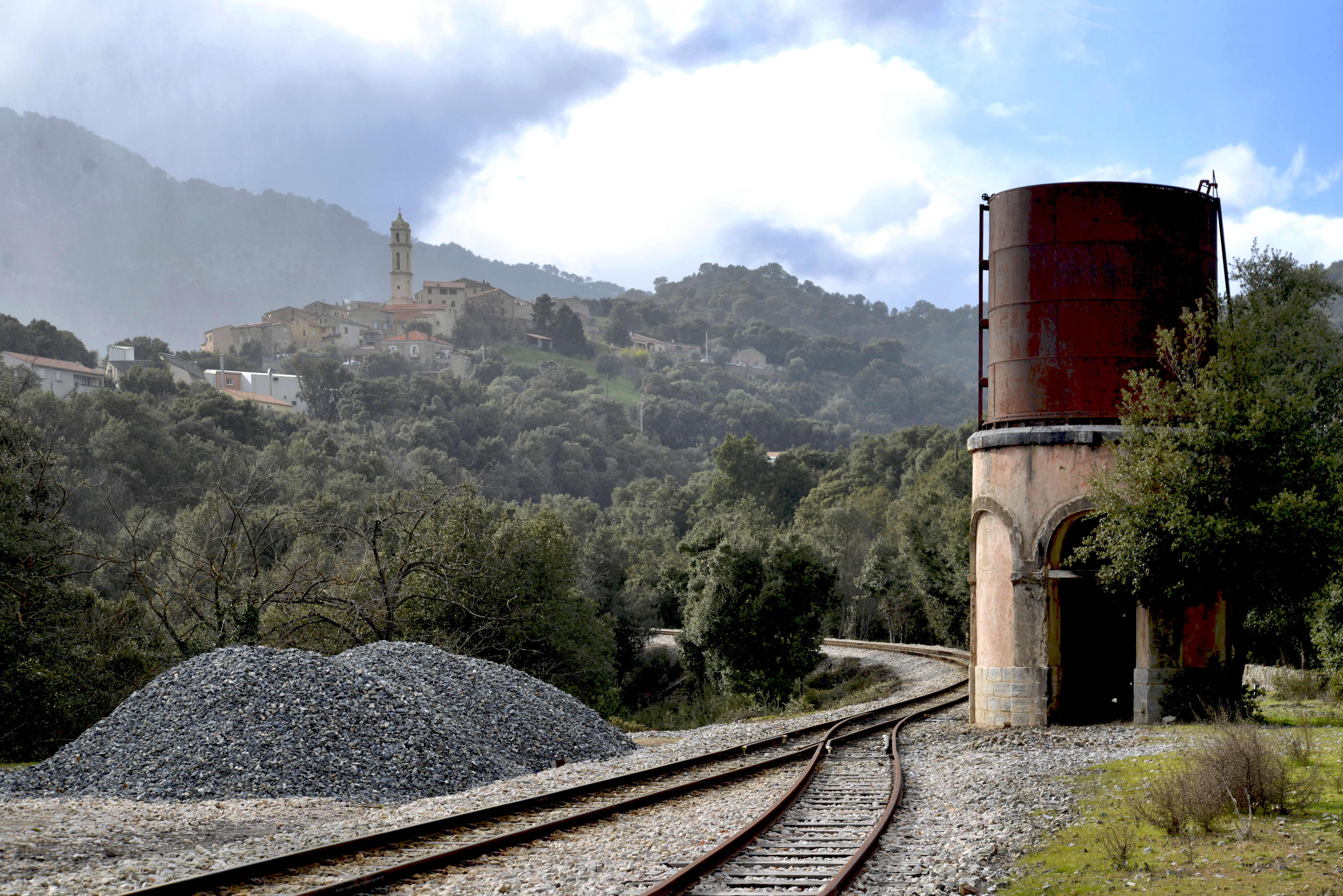 Soveria, Talcini (Haute-Corse) - Le château d'eau de l'ancienne gare désaffectée. À l'arrière-plan le village de Soveria